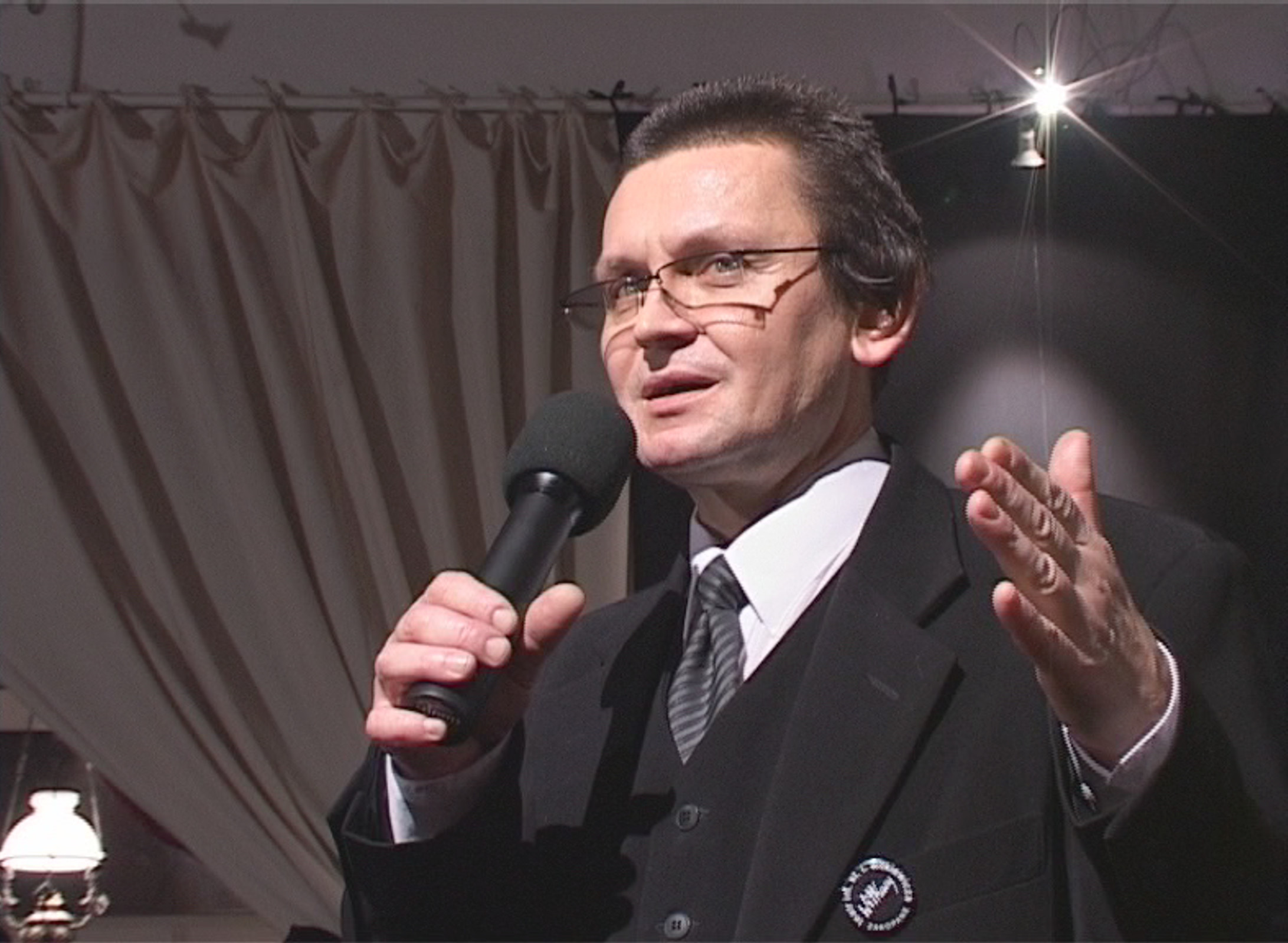 Andrzej Dziuk, dyrektor Teatru Witkacego w Zakopanem w dniu jubileuszu teatru.